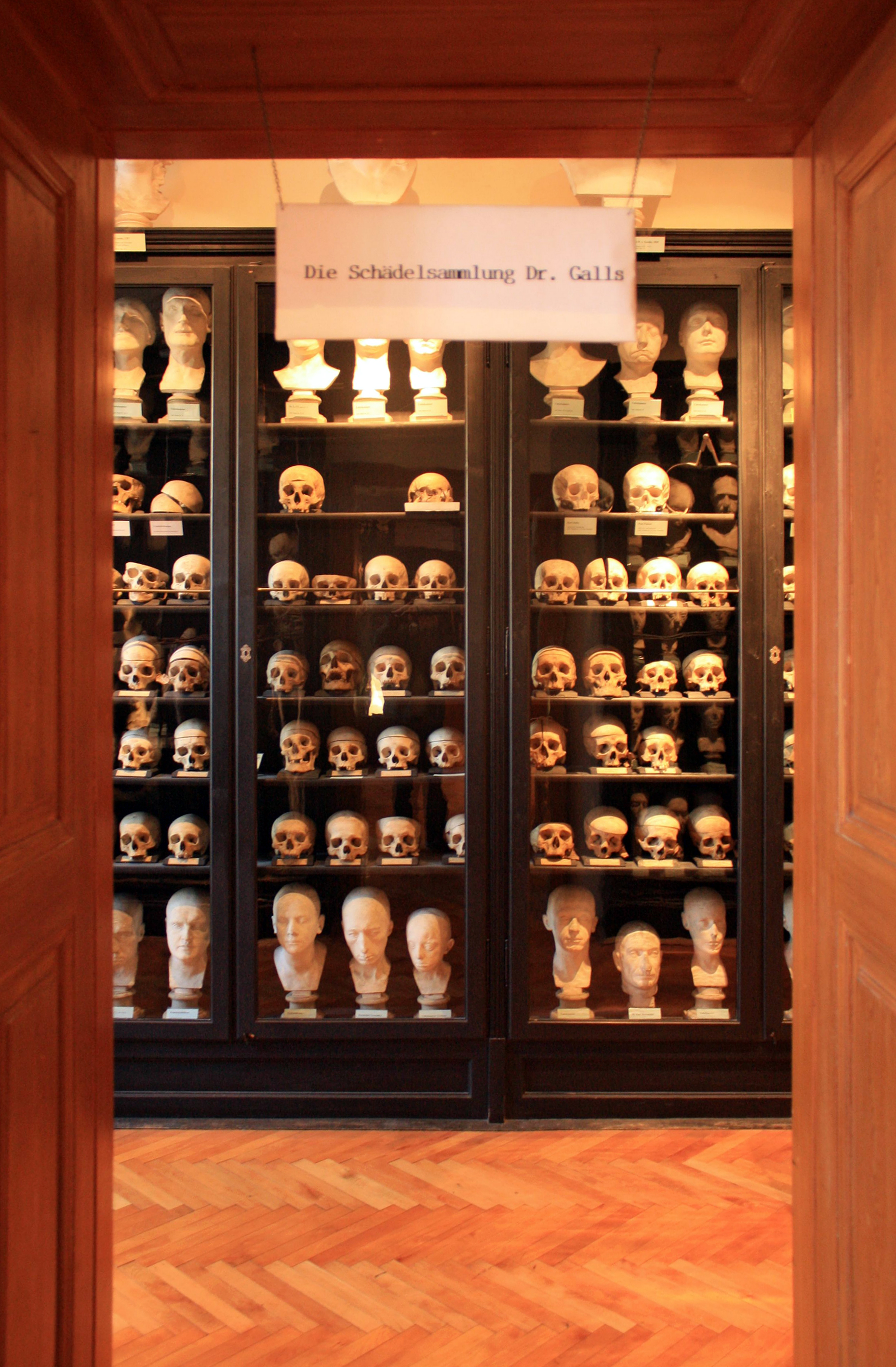 Ausstellungsstück im Rollettmuseum in Baden, Niederösterreich